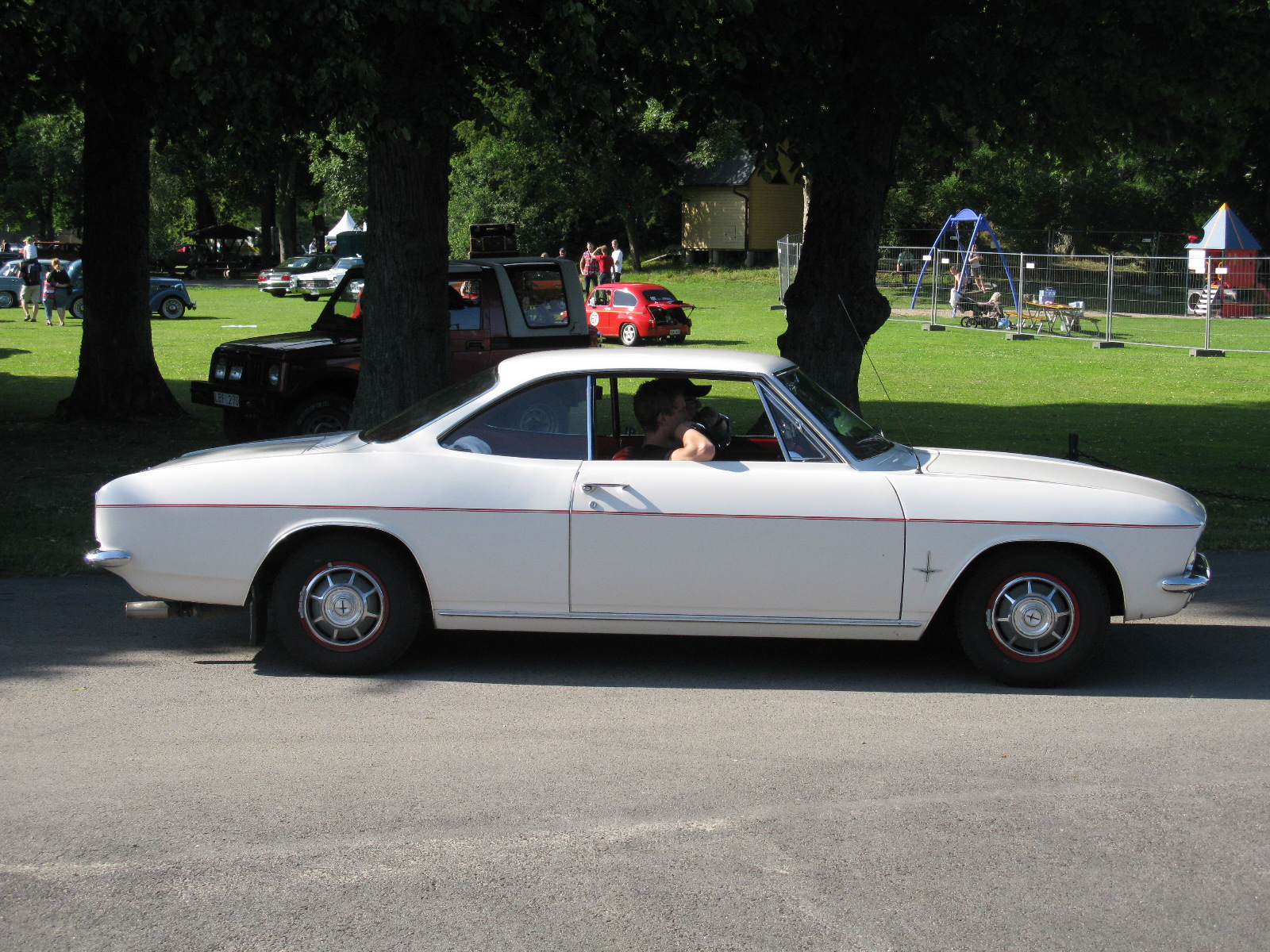 Chevrolet Corvair